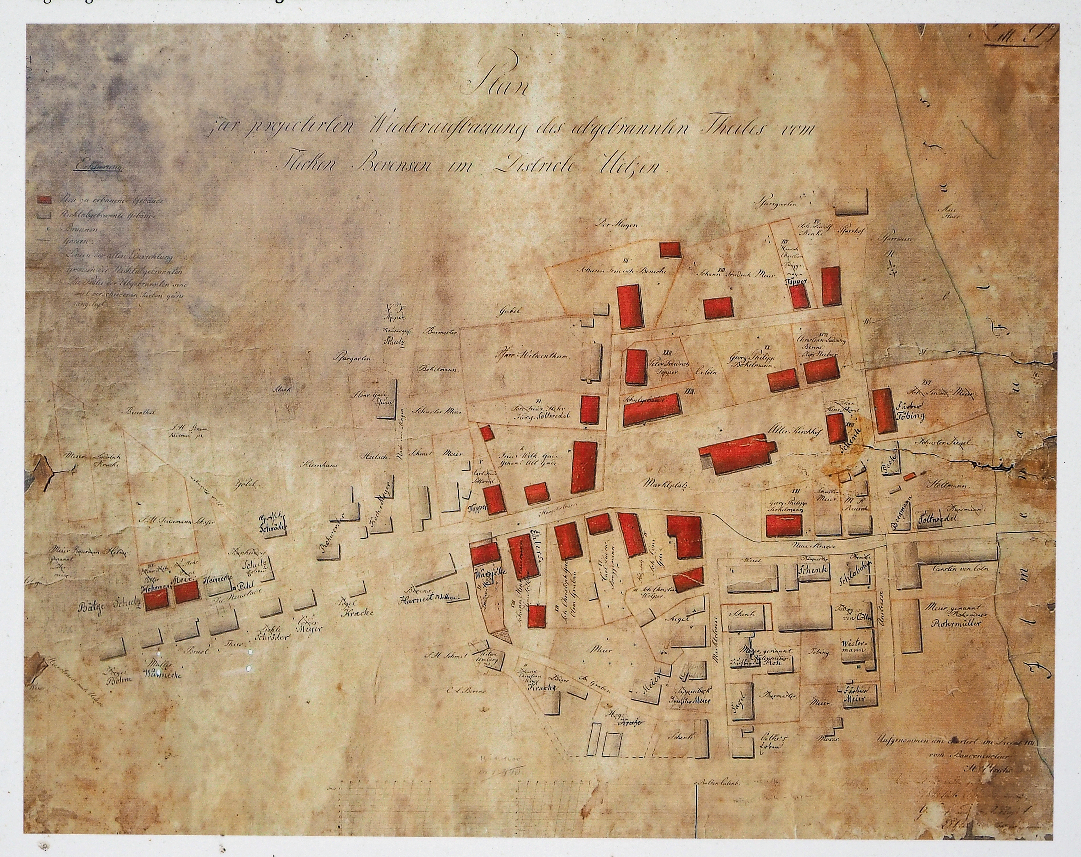 Wiederaufbauplan von Bad Bevensen, nach dem Brand von 1811 (wahrscheinlich von C. F. W. Mithoff erarbeitet). Quelle: F. Brohmann, Geschichte von Bevensen und Kloster Medingen. Gezeichnet von H. Ulrichs, Stadtarchiv Bad Bevensen. (Plan hängt öffentlich in Bad Bevensen aus).